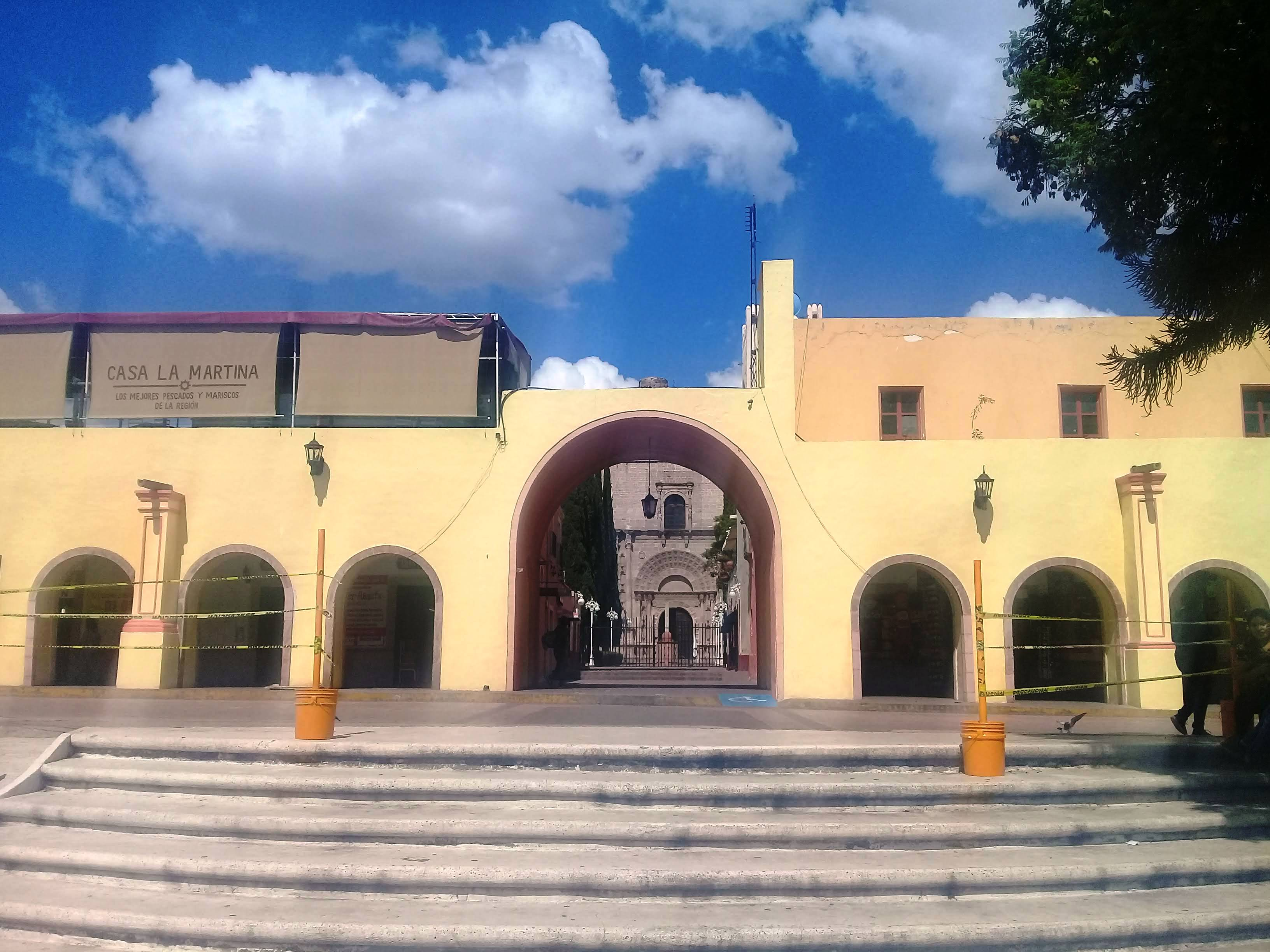 Plaza Juárez en Actopan, Hidalgo, México.